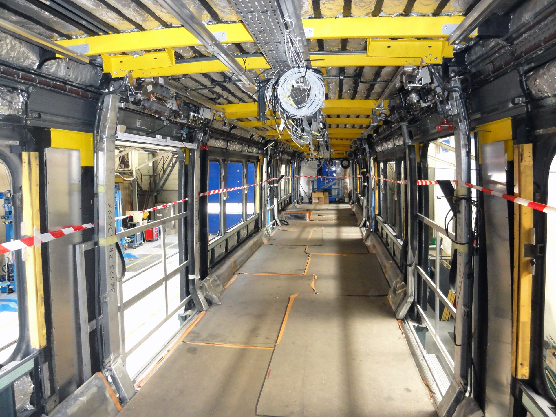 Rénovation du MI 79 aux ateliers RATP de Sucy-en-Brie, Val-de-Marne, France.